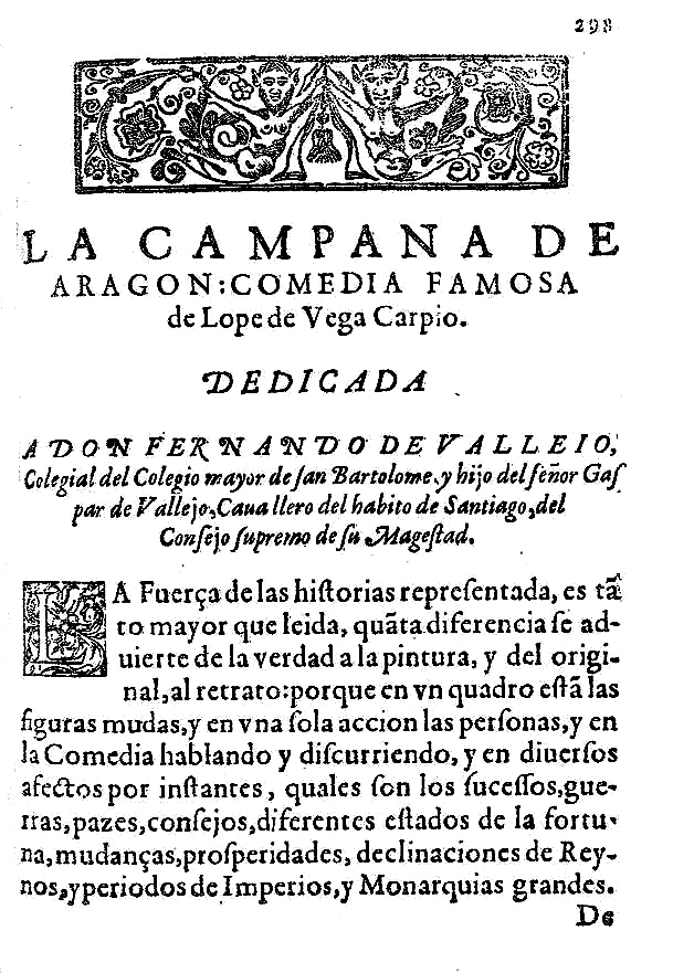 Página inicial de La Campana de Aragón, de Félix Lope de Vega y Carpio, tomada de la Decimaoctaua parte de las Comedias de Lope de Vega Carpio..., En Madrid, por Iuan Gonçalez, a costa de Alonso Perez..., 1623, ff. 208-236. Localización: Biblioteca Nacional (España). Sig. R-14111.